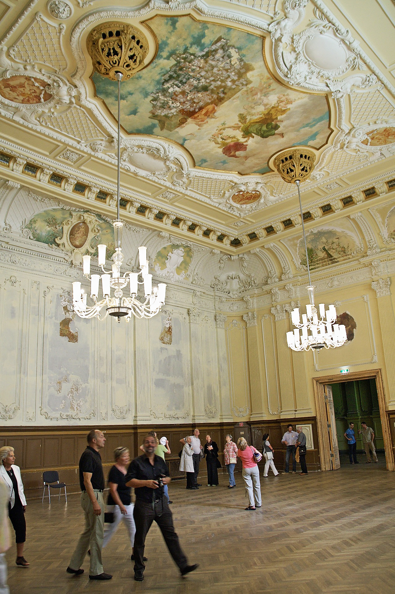 Hôtel de Pologne, Hainstraße 16-18: Ansicht Großer Ballsaal.